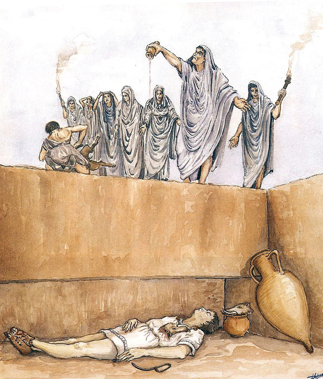 Reconstrucció d'un ritual funerari amb soterrament en fosa. Necròpoli del Carrer Cañete (actual ciutat de València). Il·lustració de F. Chiner.